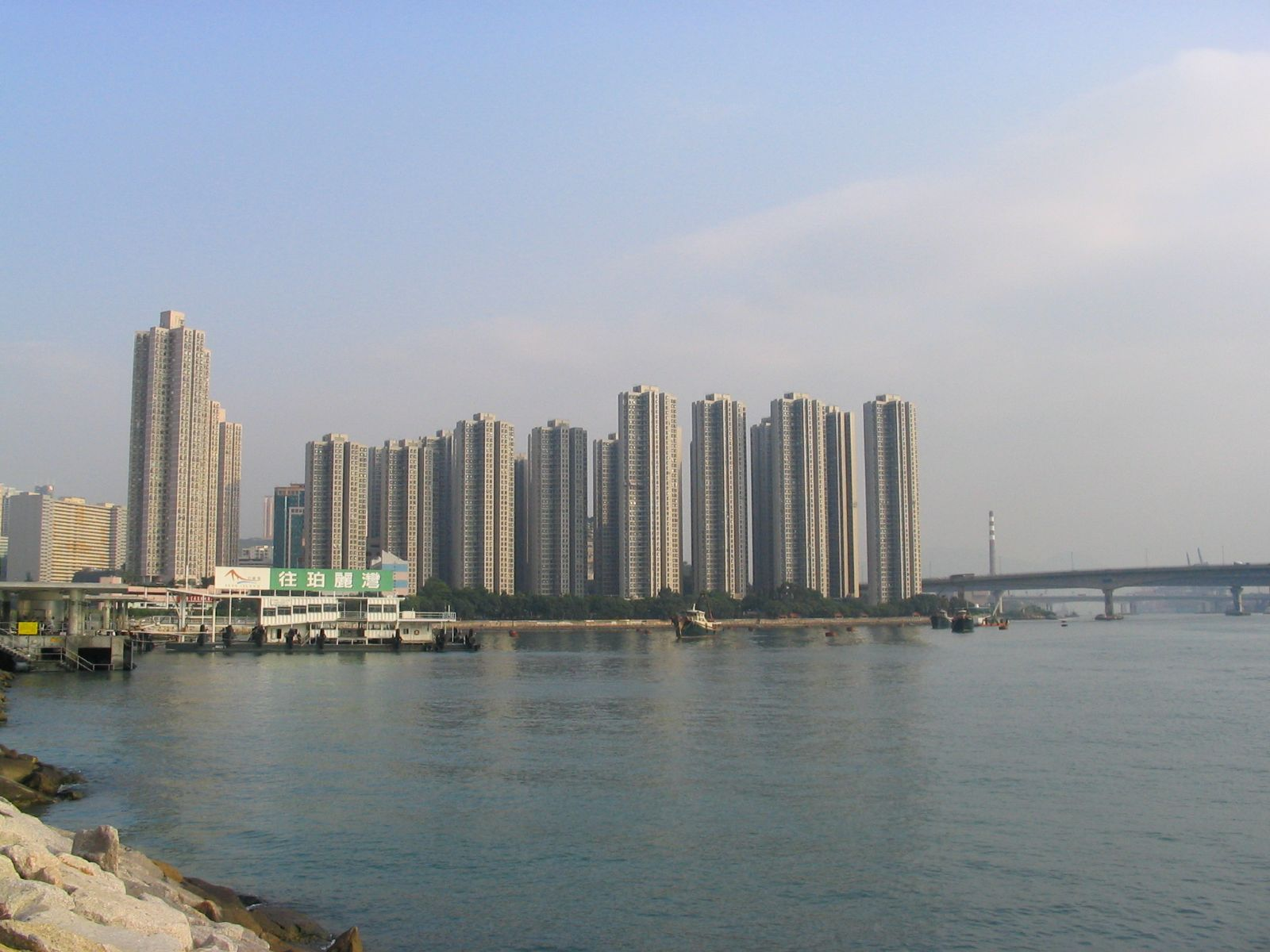 荃灣-海濱花園 Riviera Gardens, Tsuen Wan